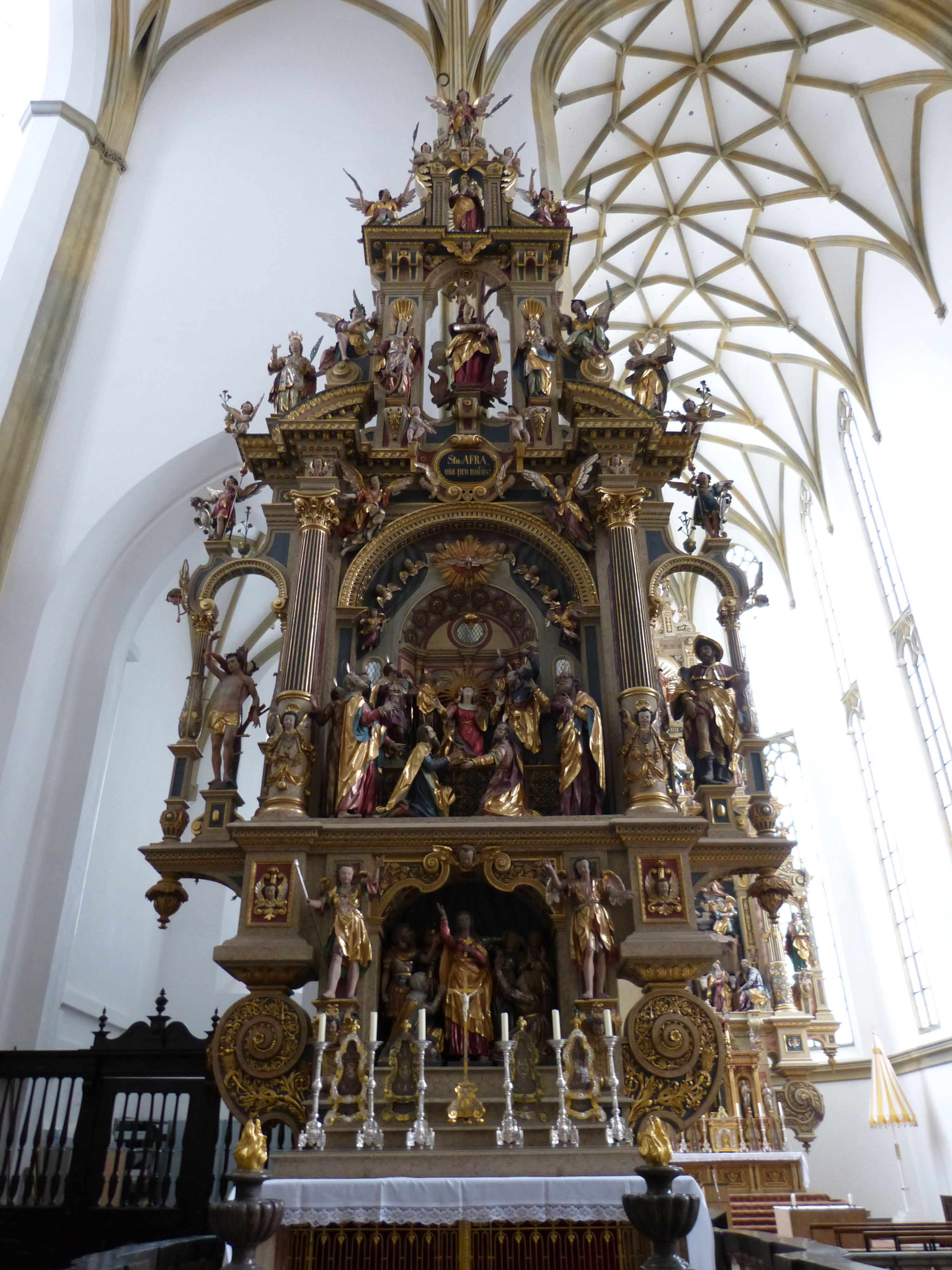 St. Ulrich und Afra, Augsburg, Bayern Linker Seitenaltar, St. Ulrich und Afra, Augsburg, Bayern